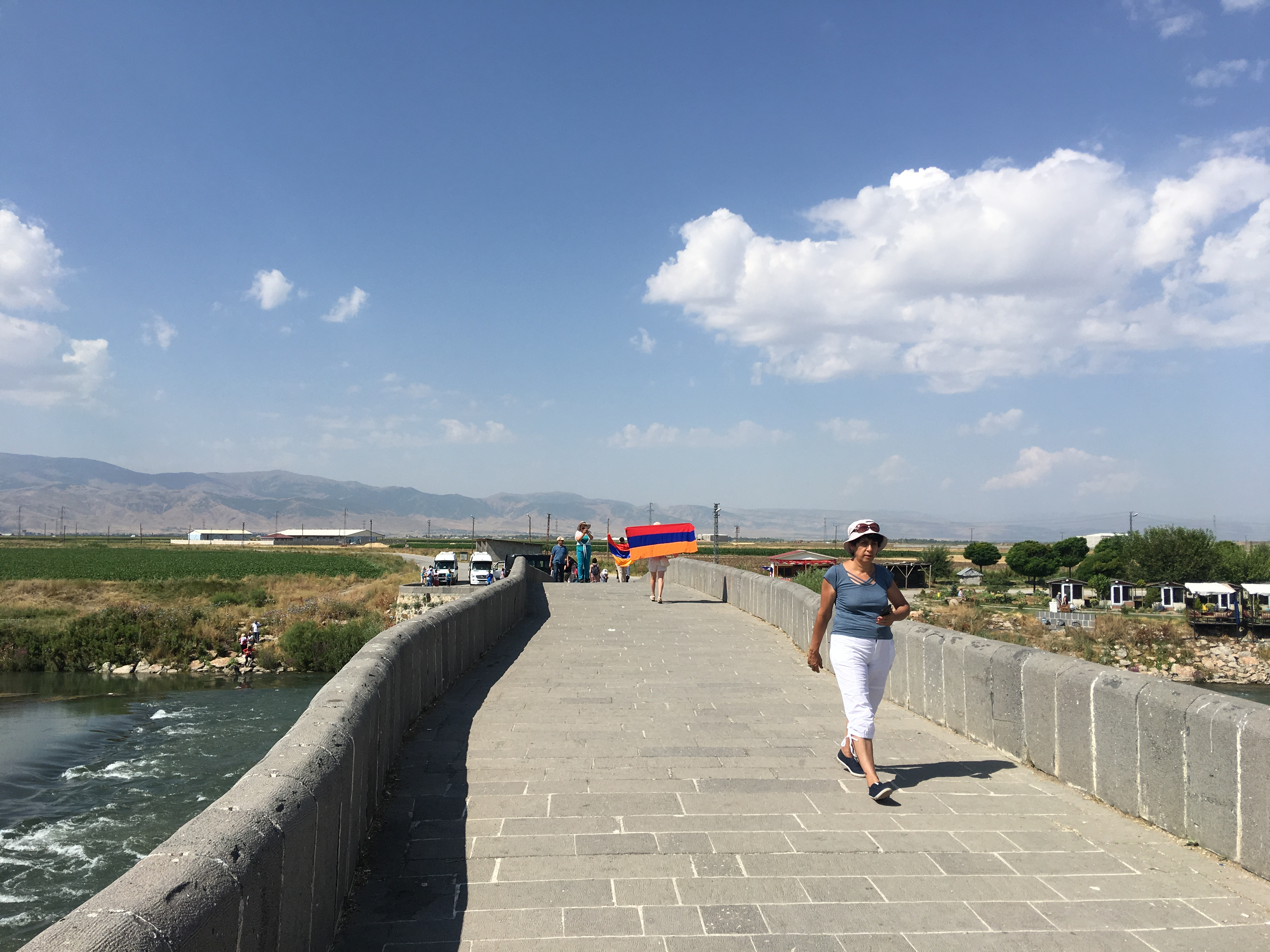 Սուլուխի կամուրջ